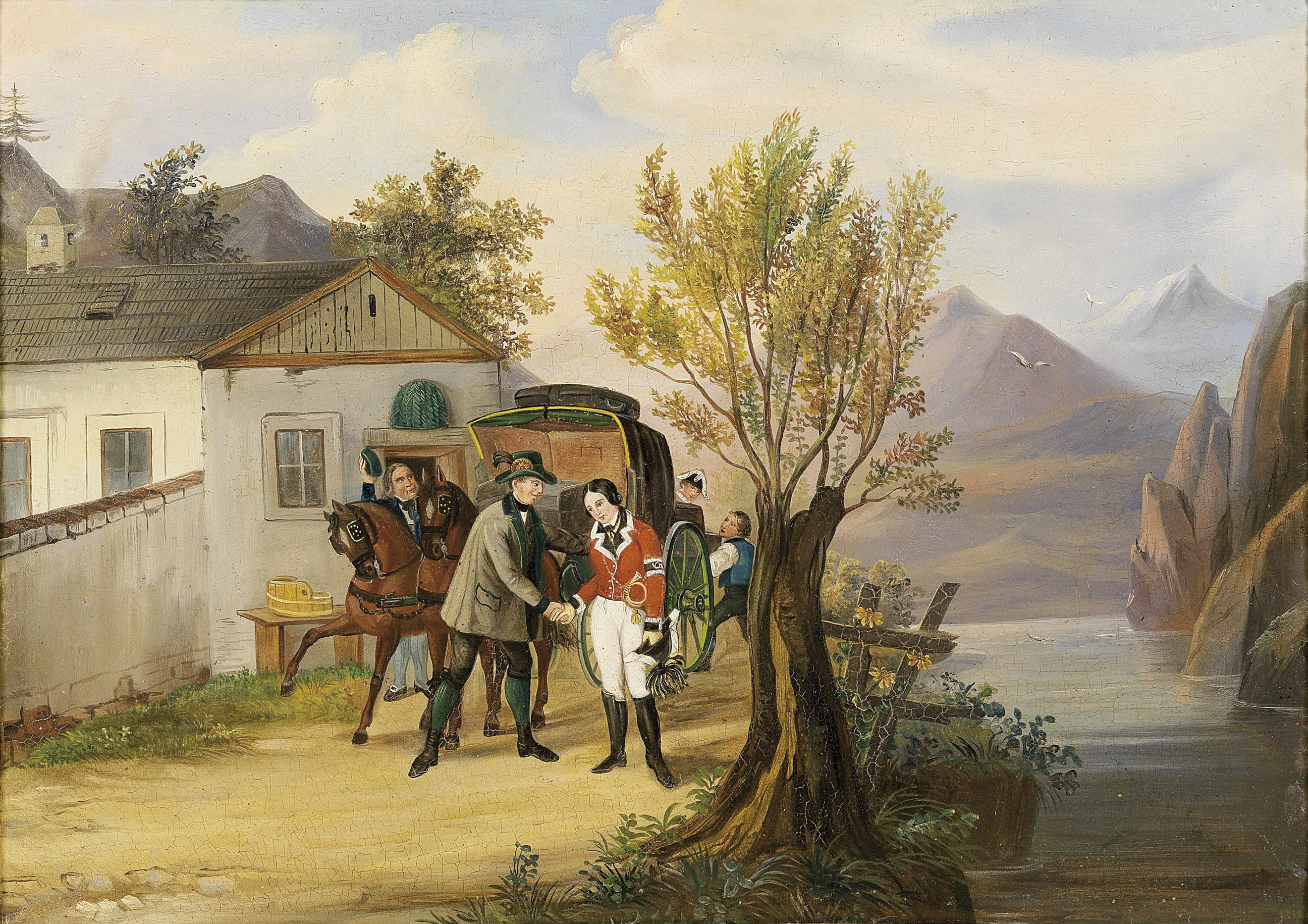 Erzherzog Johann und Anna Plochl vor dem Postmeistershaus am Grundlsee, Gemälde von einer Bilderuhr, 19. Jahrhundert, Bildausschnitt 40 x 56 cm